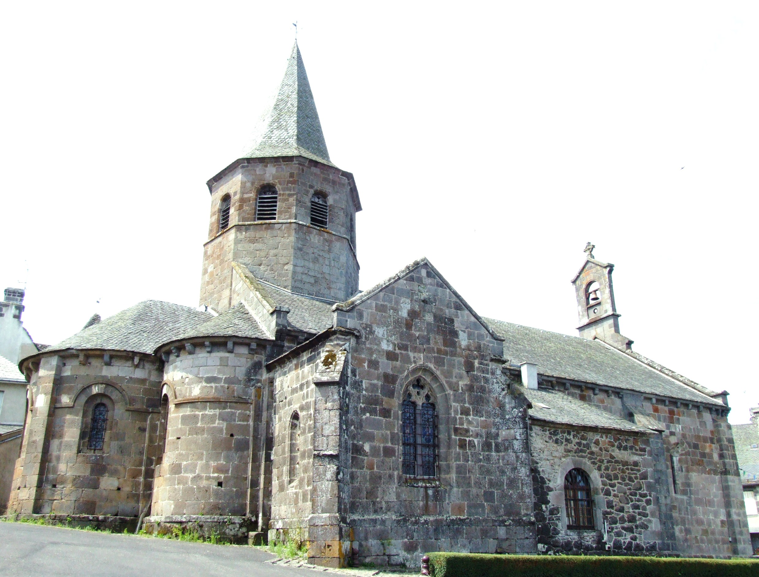 Anglards-de-Salers - Eglise Saint-Thyrse -1